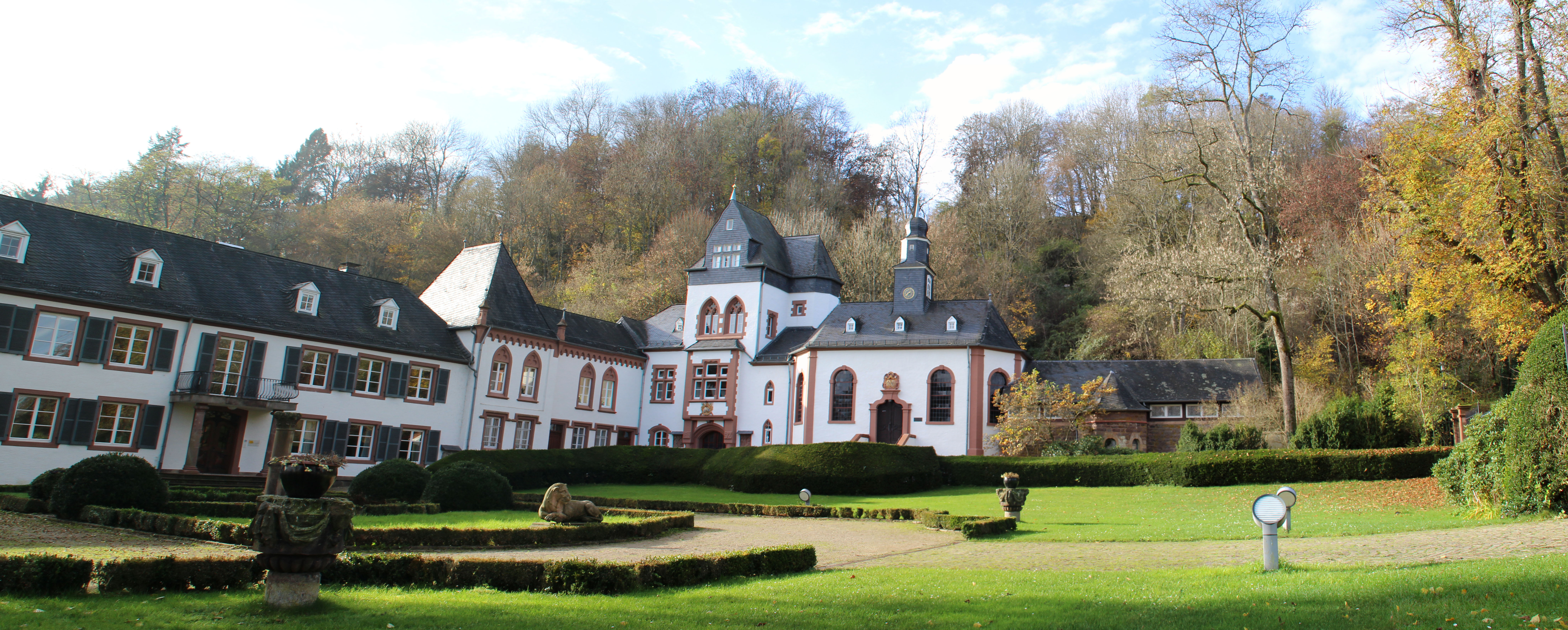 Schloss Dagstuhl mit Schlosspark